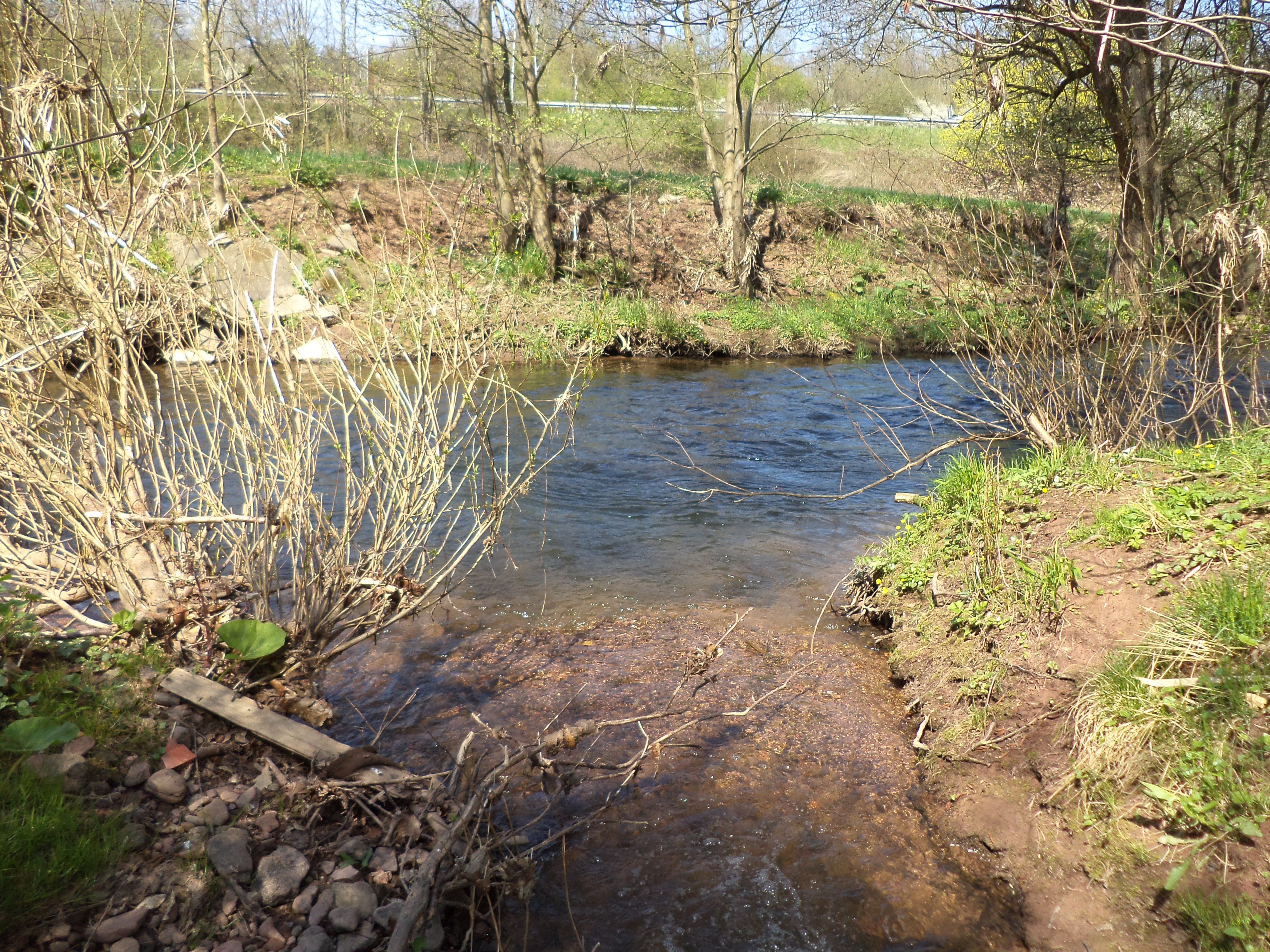 Der Ahlerbach mündet bei Schlüchtern-Niederzell in die Kinzig